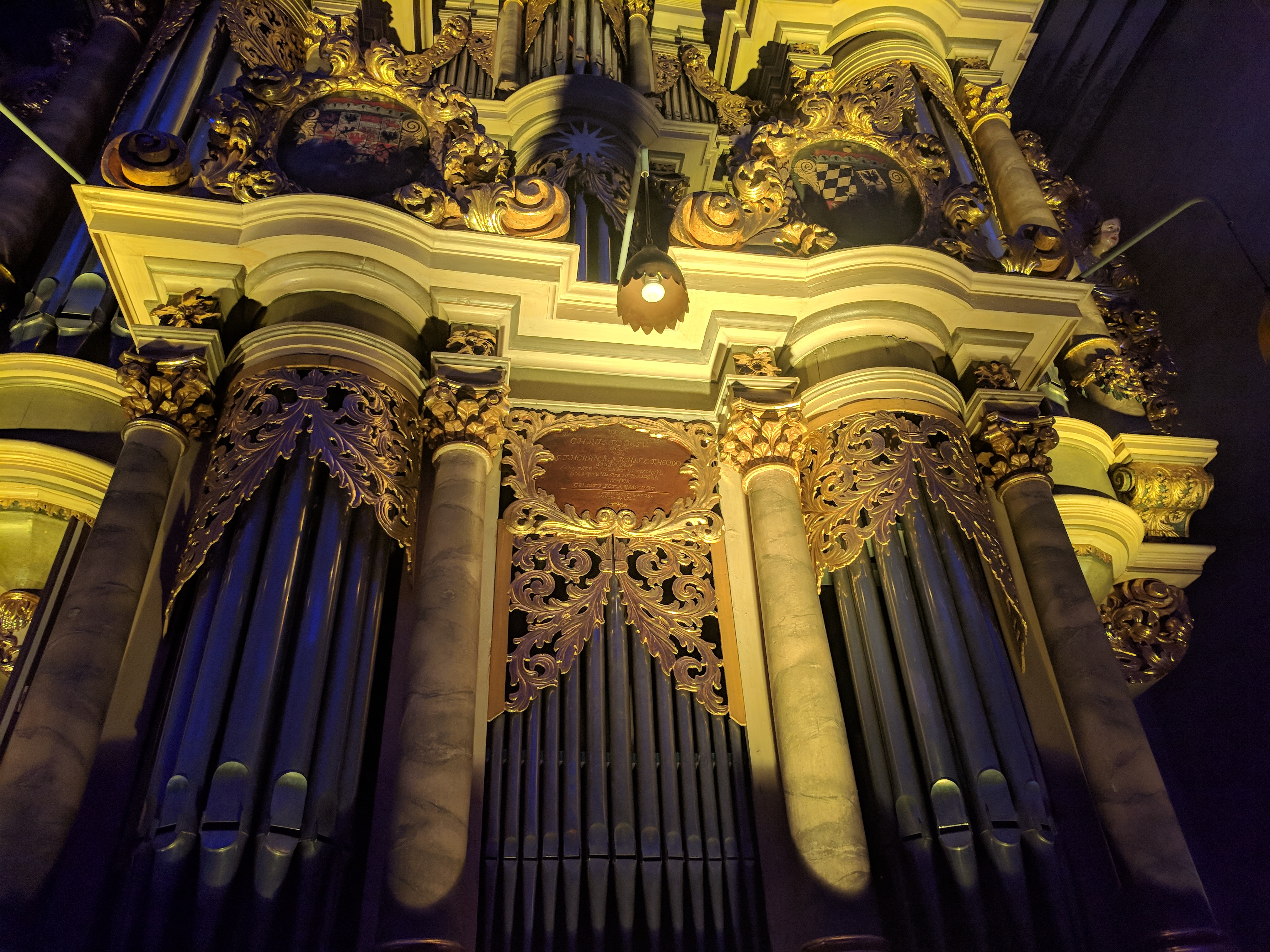 Detailansicht der Orgel von Johann Georg Allgeyer d. Ä. der Johanneskirche zu Crailsheim.